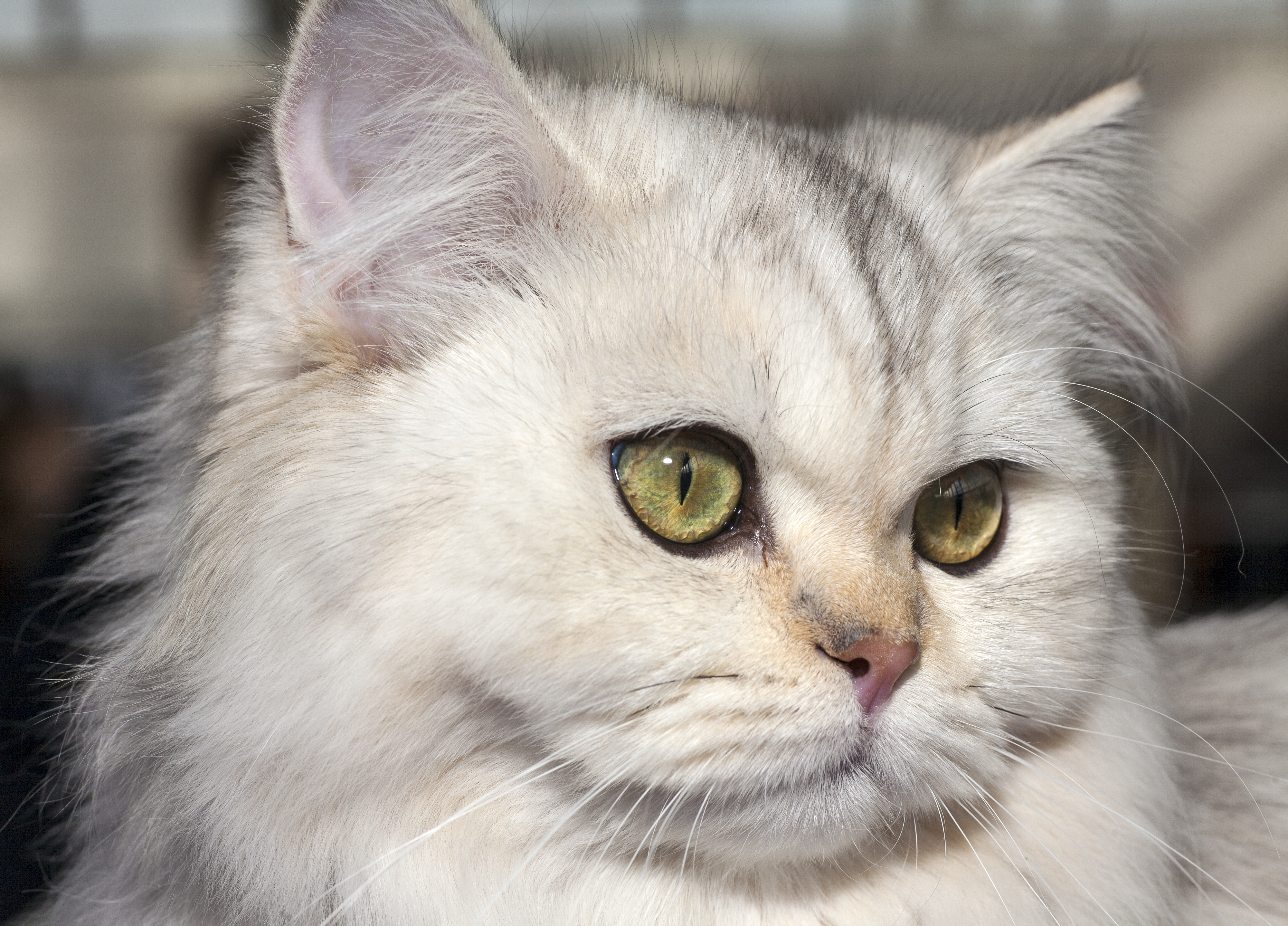 Британская длинношёрстная кошка Bounty Amouge, №4 по каталогу международной выставки кошек клуба «РосКош» «Золотая Осень-2014» (WCF). Кошка. Окрас: серебристый затушёванный (BLH ns 11). Дата рождения: 25/03/2014. Владельцы Н и Е. Глуховы. Клуб «Альянс», Орехово-Зуево